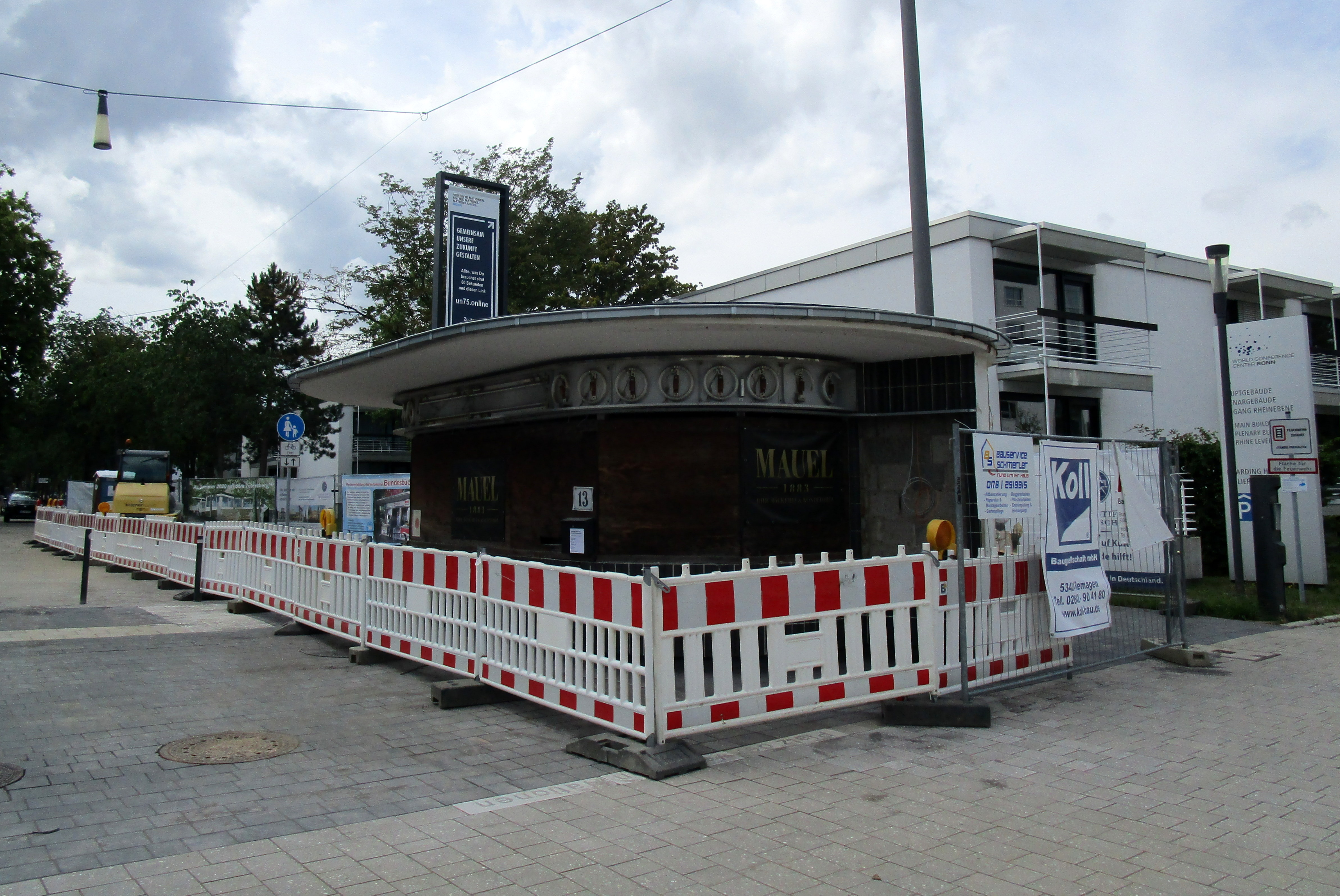 Bundesbüdchen, Heussallee (Ecke Platz der Vereinten Nationen), Bonn-Gronau: Aufnahme während der Sanierung nach der Wiederaufstellung 2020